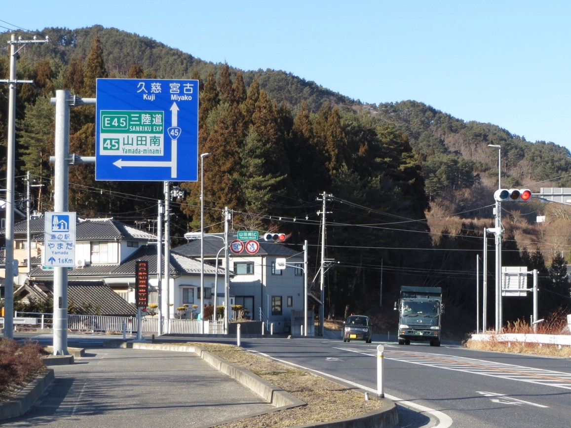 山田南インターチェンジ Canon IXY 3